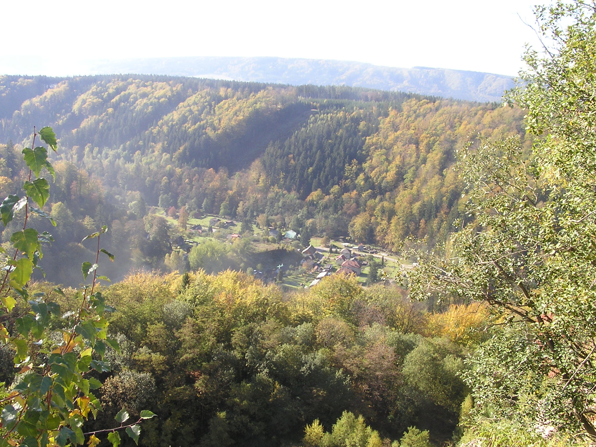 Údolí v Liticích nad Orlicí